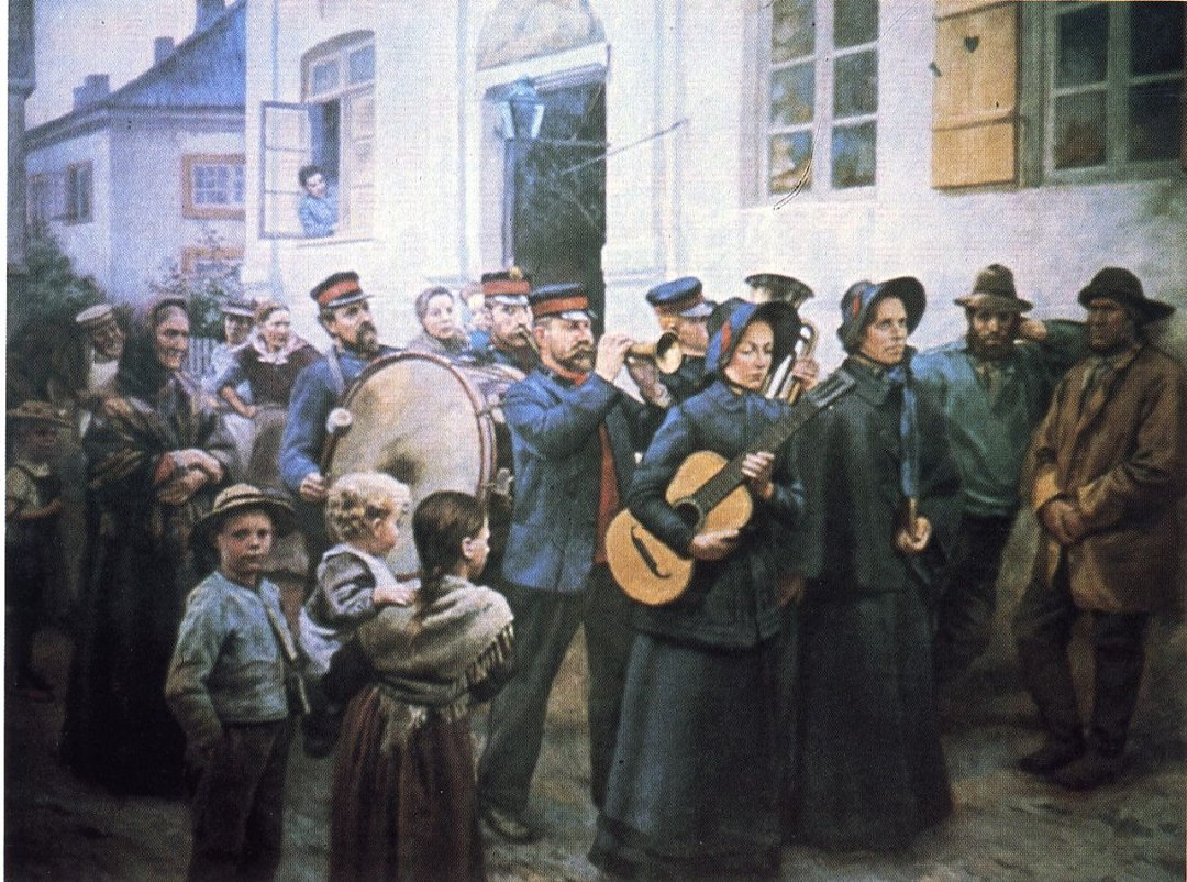 Norwegian: Original title: «Stormangrep på en fiskerlandsby» Salvation Army, Norway.